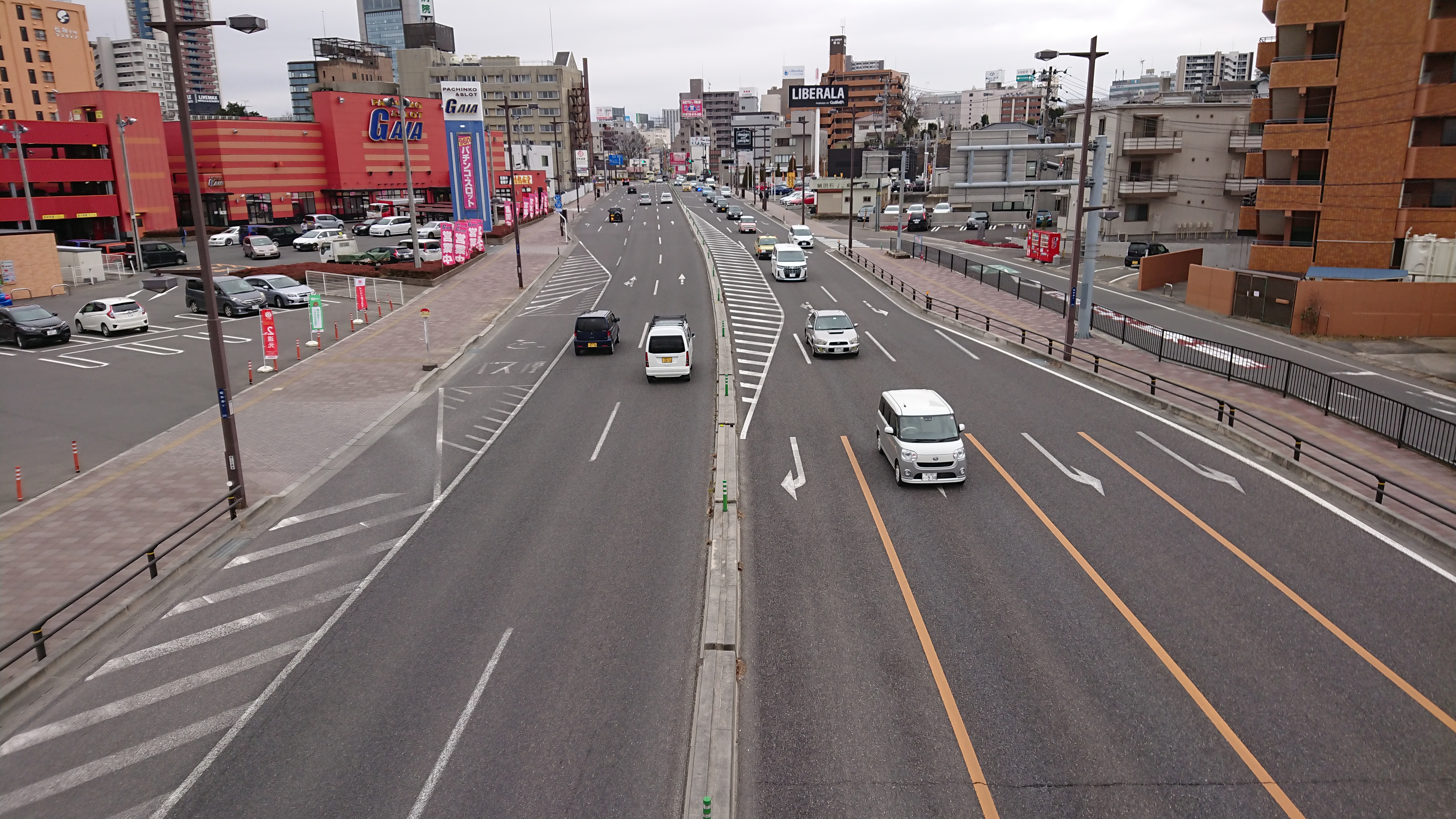 若葉町交差点歩道橋より南（起点）へ向かって。